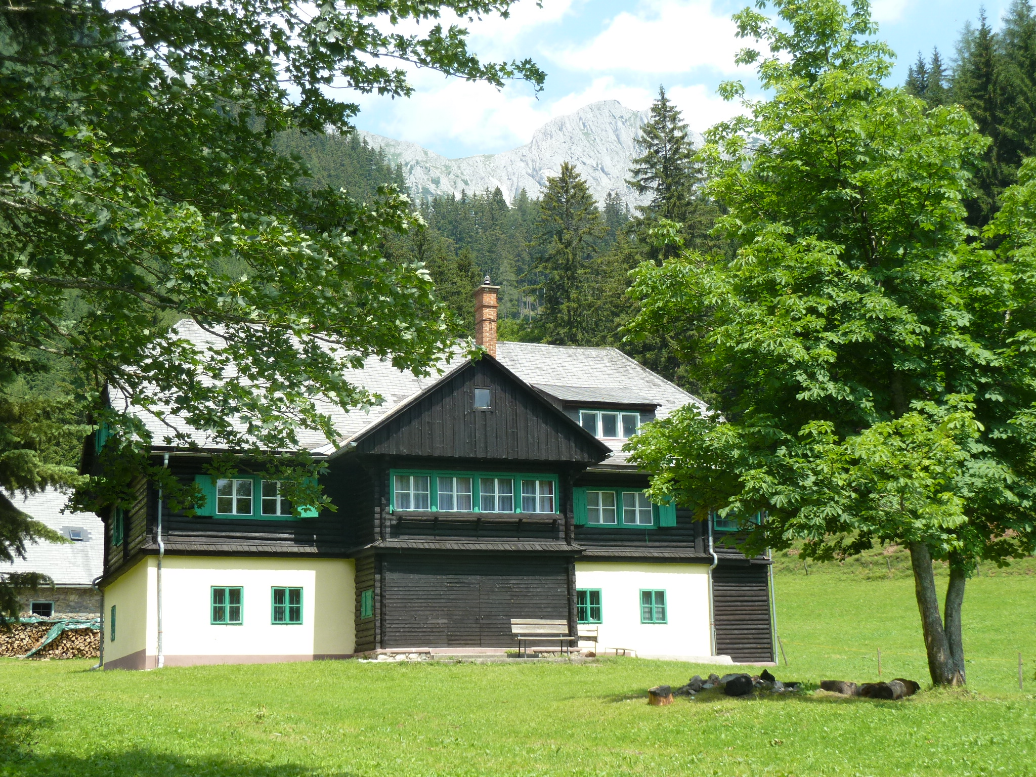 Forsthaus Lahnhube der Forstschule Bruck an der Mur